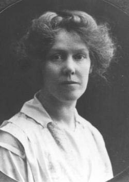 Bild von Edith Maryon in ihrer Dornacher Zeit